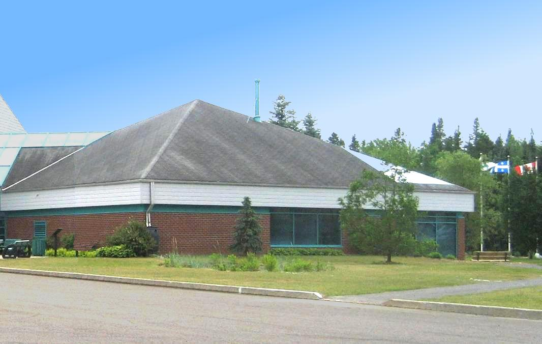 Bibliothèque Jean-Luc Grondin à Stoneham Qc Canada